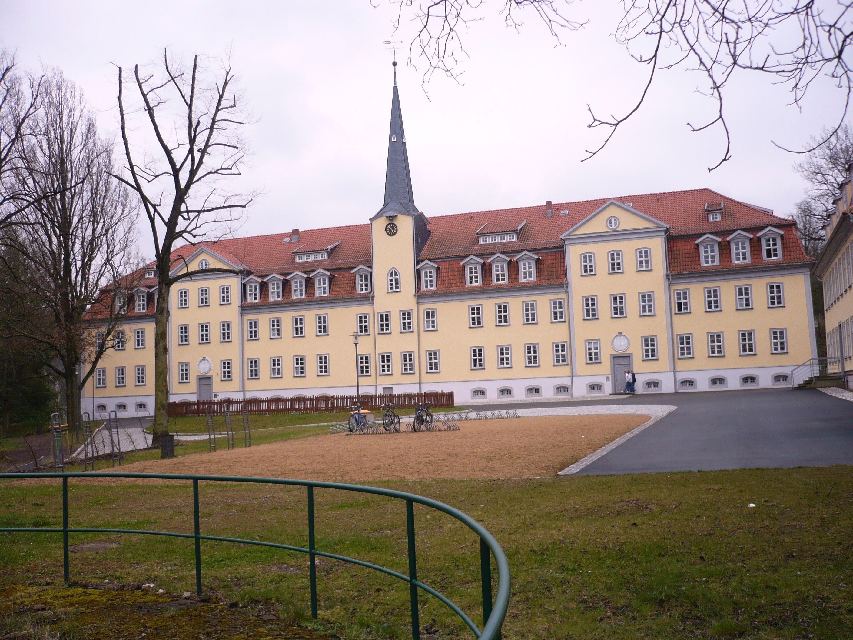 Hauptgebäude der Salzmannschule in Waltershausen- Schnepfenthal